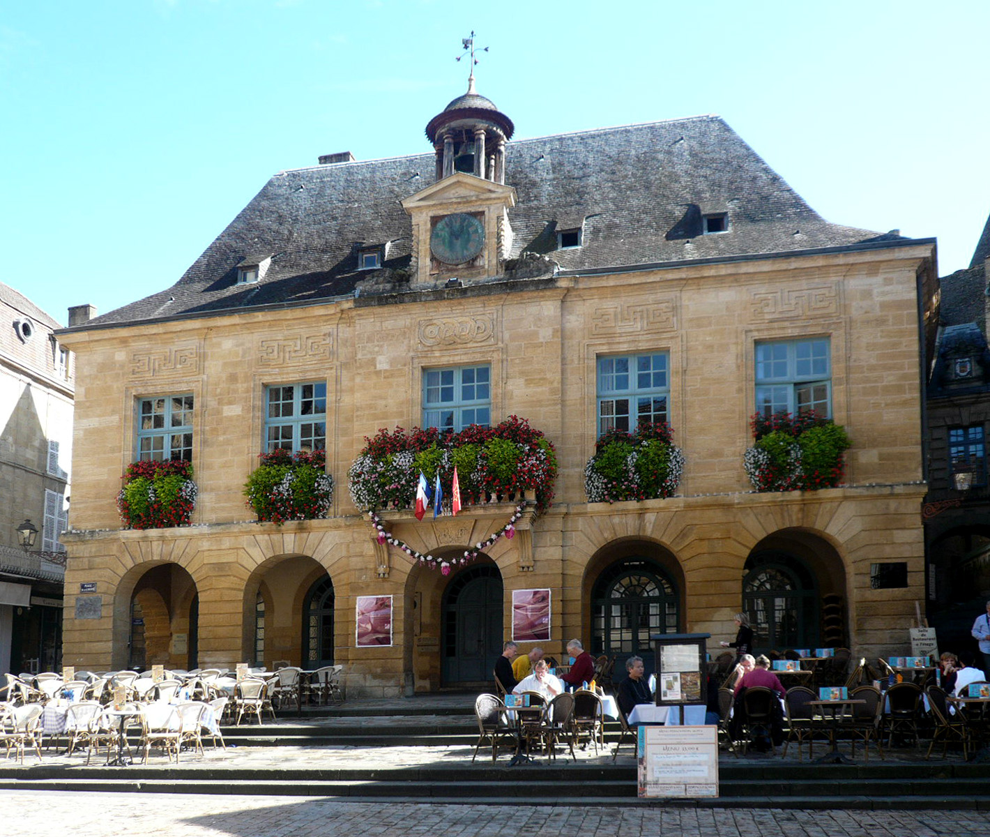 Mairie de Sarlat